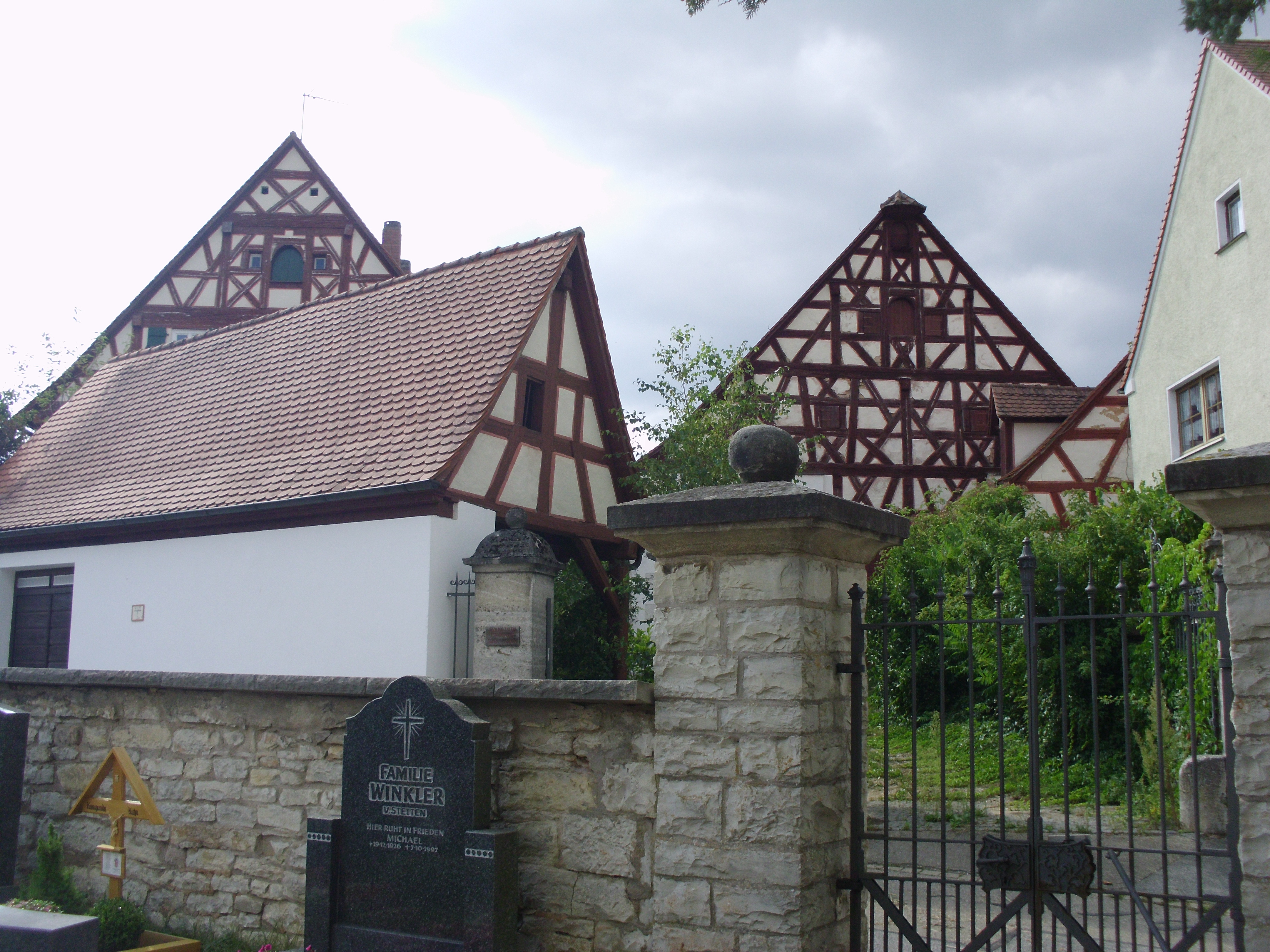 Schwimbach. Ortsteil von Thalmässing im mittelfränkischen Landkreis Roth,Fachwerkbauten an der Pfarrkirche St.Lorenz